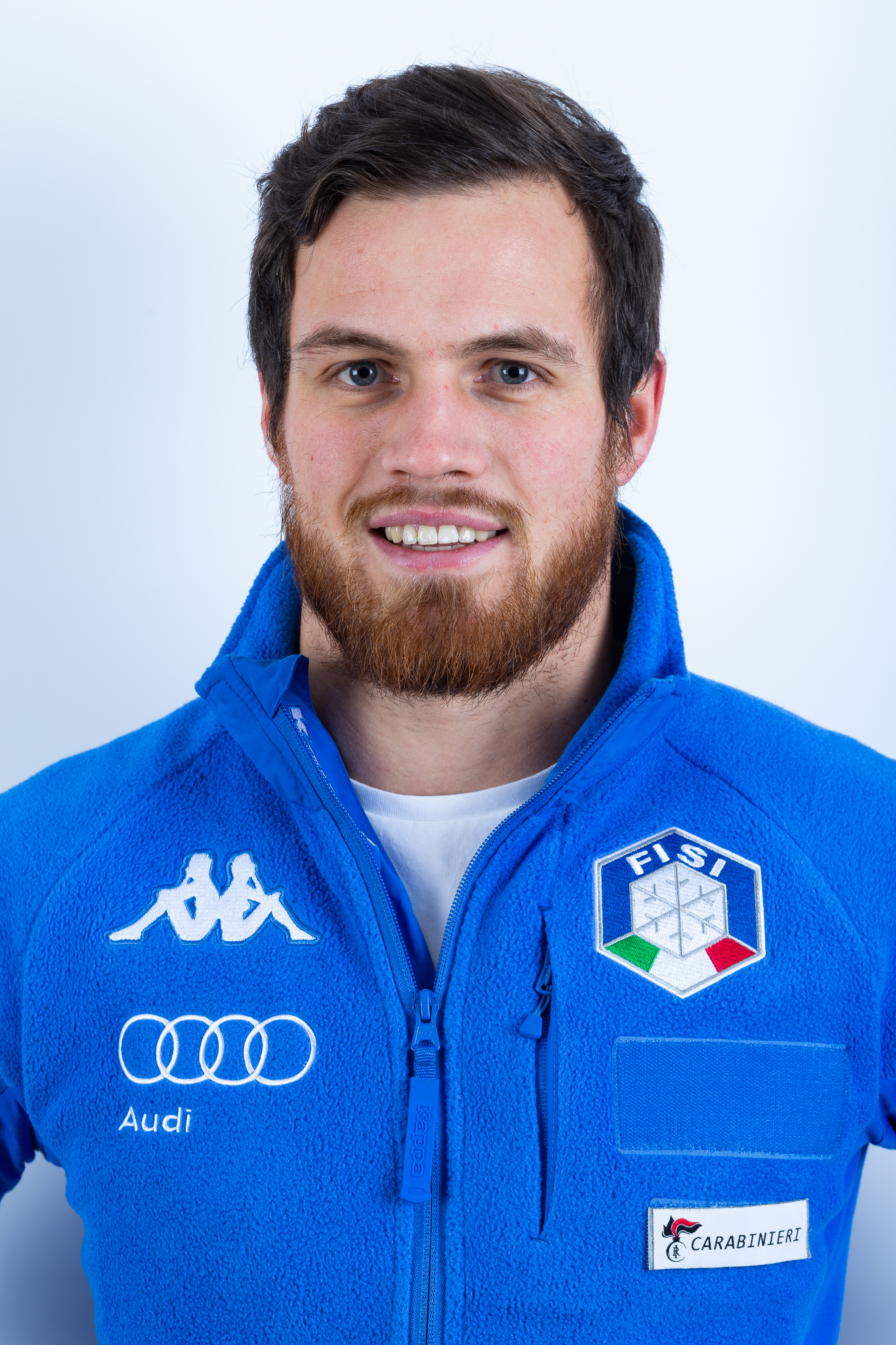 Rastner, Patrick (ITA, Italien)